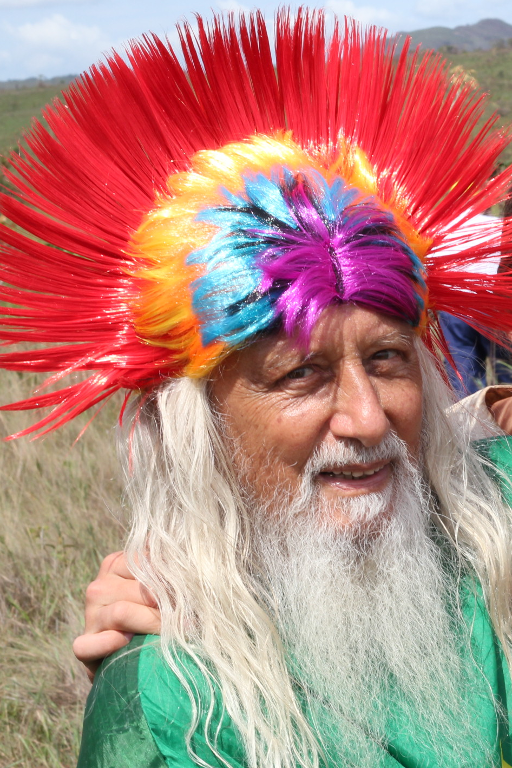 Amarílio Hévia de Carvalho en Bona Espero